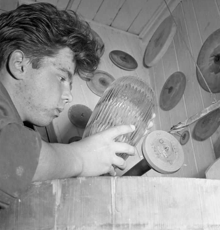 Neu-Gablonz bei Kaufbeuren/Schwaben Lehrling der Staatsfachschule beim Glasschleifen